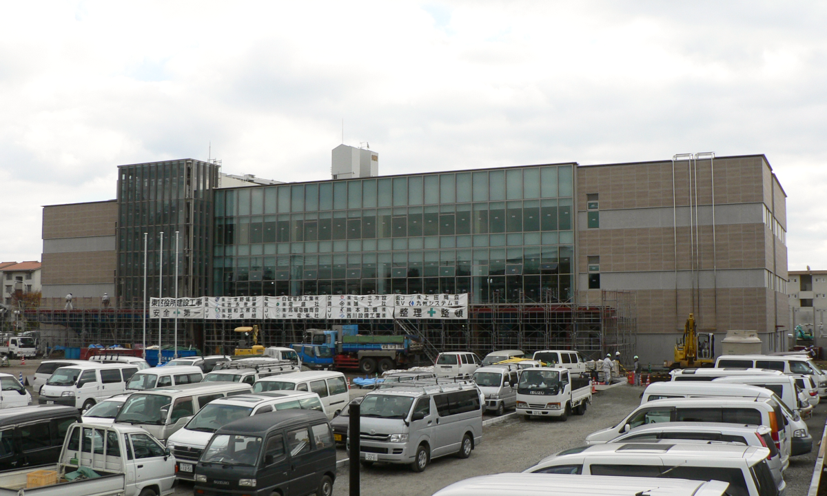 建設中の熊本市東区役所